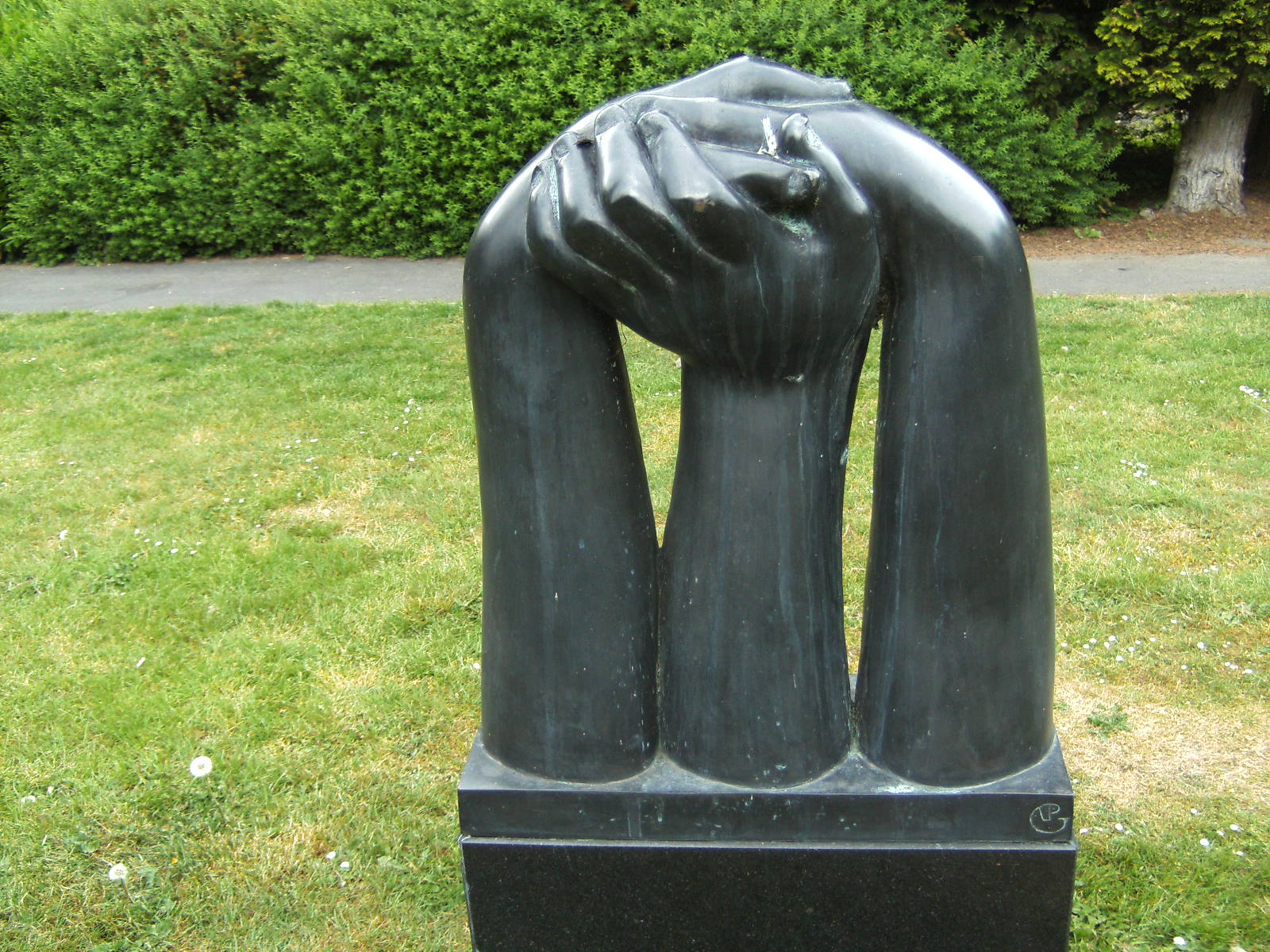 'Trois Mains' van Pepe Gregoire. Drie Dorische zuilen dragen een tempaan